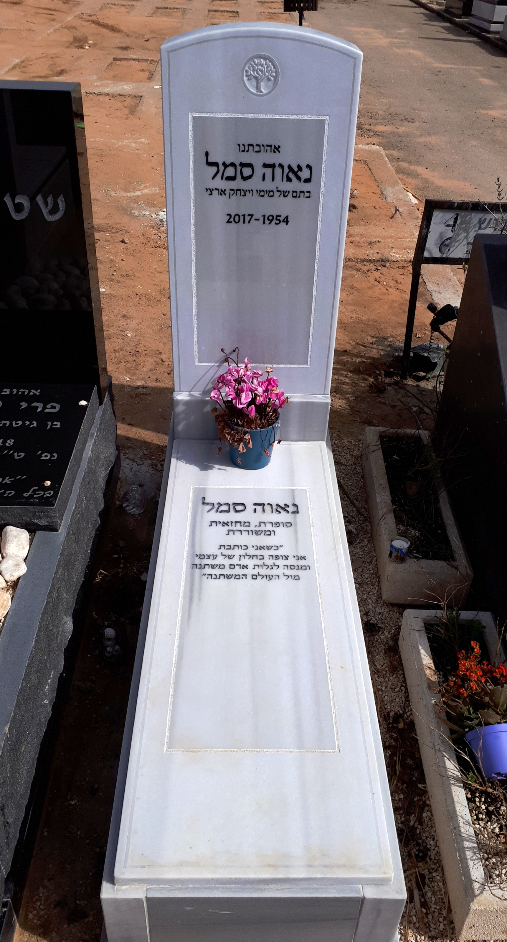 מצבת קבר נאוה סמל